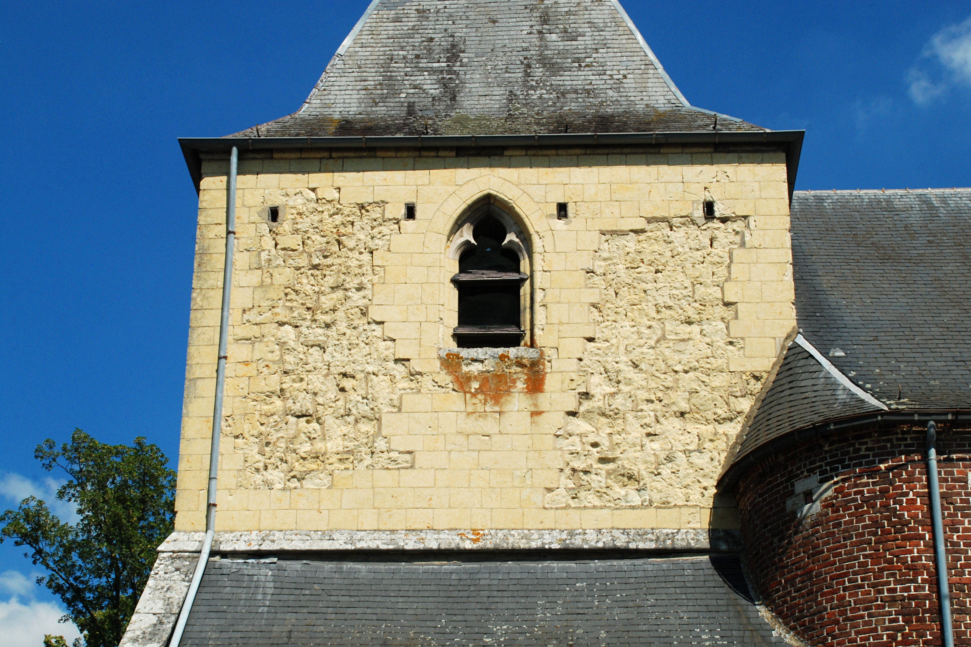 Belgique - Brabant wallon - Hélécine - Linsmeau - Église Saint-Pierre